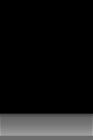 iPhone OS 3.0 までの固定壁紙